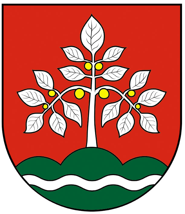 Erb obce Orechová Potôň